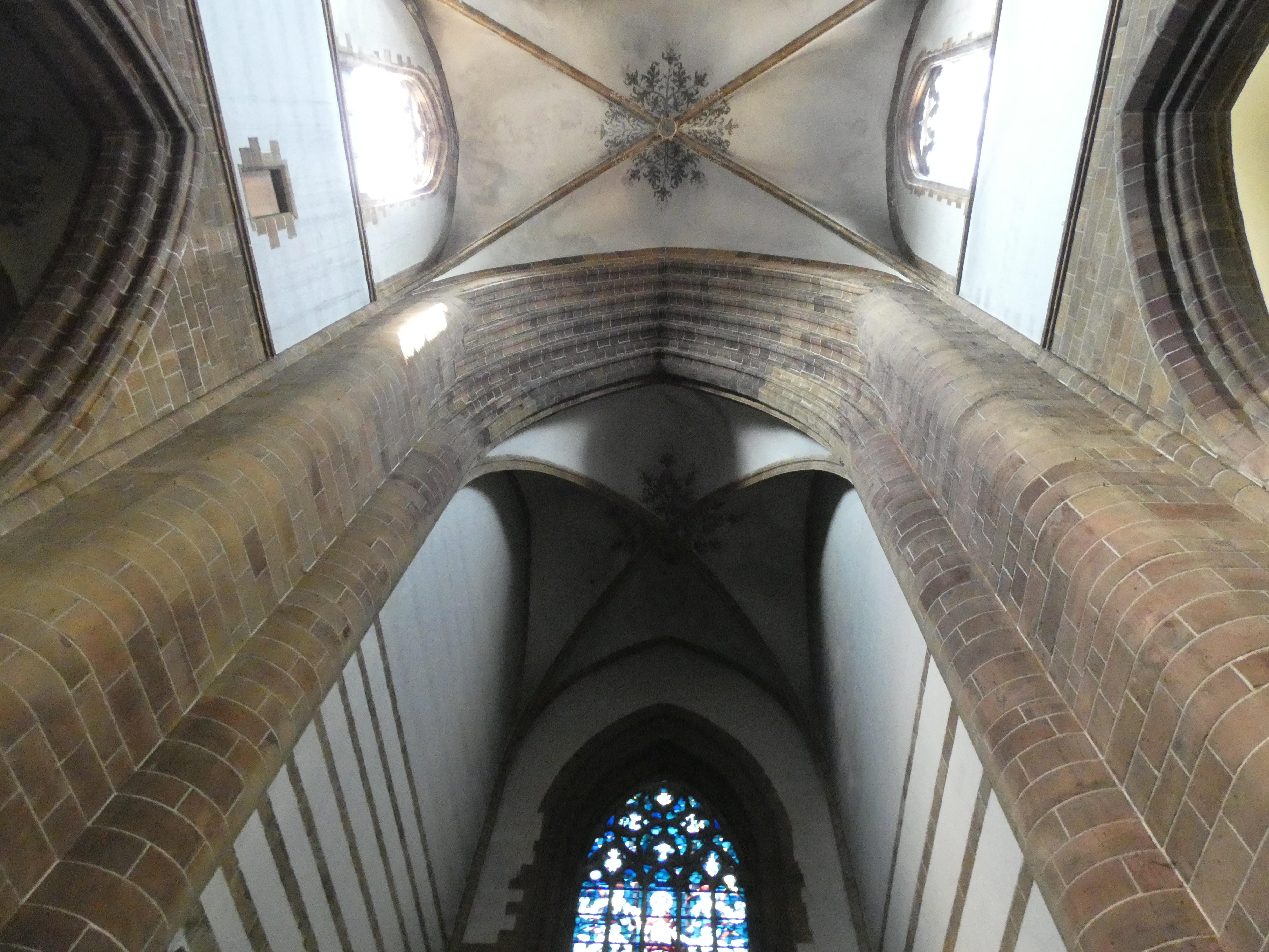 Zicht op de binnenkant van den Onze-Lieve-Vrouwetoren (westertoren) van Aarschot. De muren zij opgetrokken in ijzerzandsteen. Opvallend is dat er geen klokkengat werd gemaakt. De klokken werden via de uurwerkkamer in de toren gehesen en van daaruit naar de klokkenkamer.